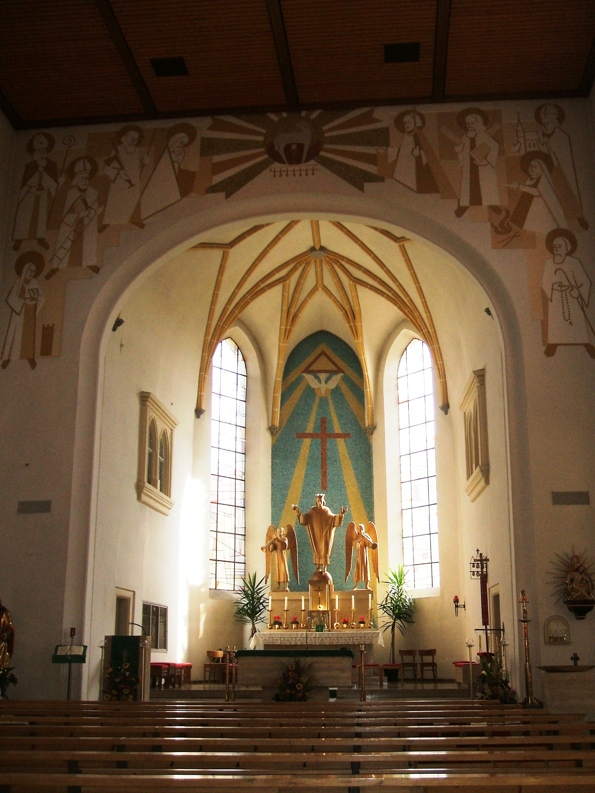 Stadtpfarrkirche St. Emmeram Windischeschenbach